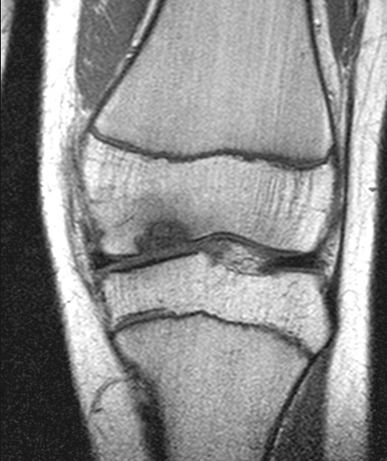 Osteochondrosis dissecans des Kniegelenkes (Magnetresonanztomographie)